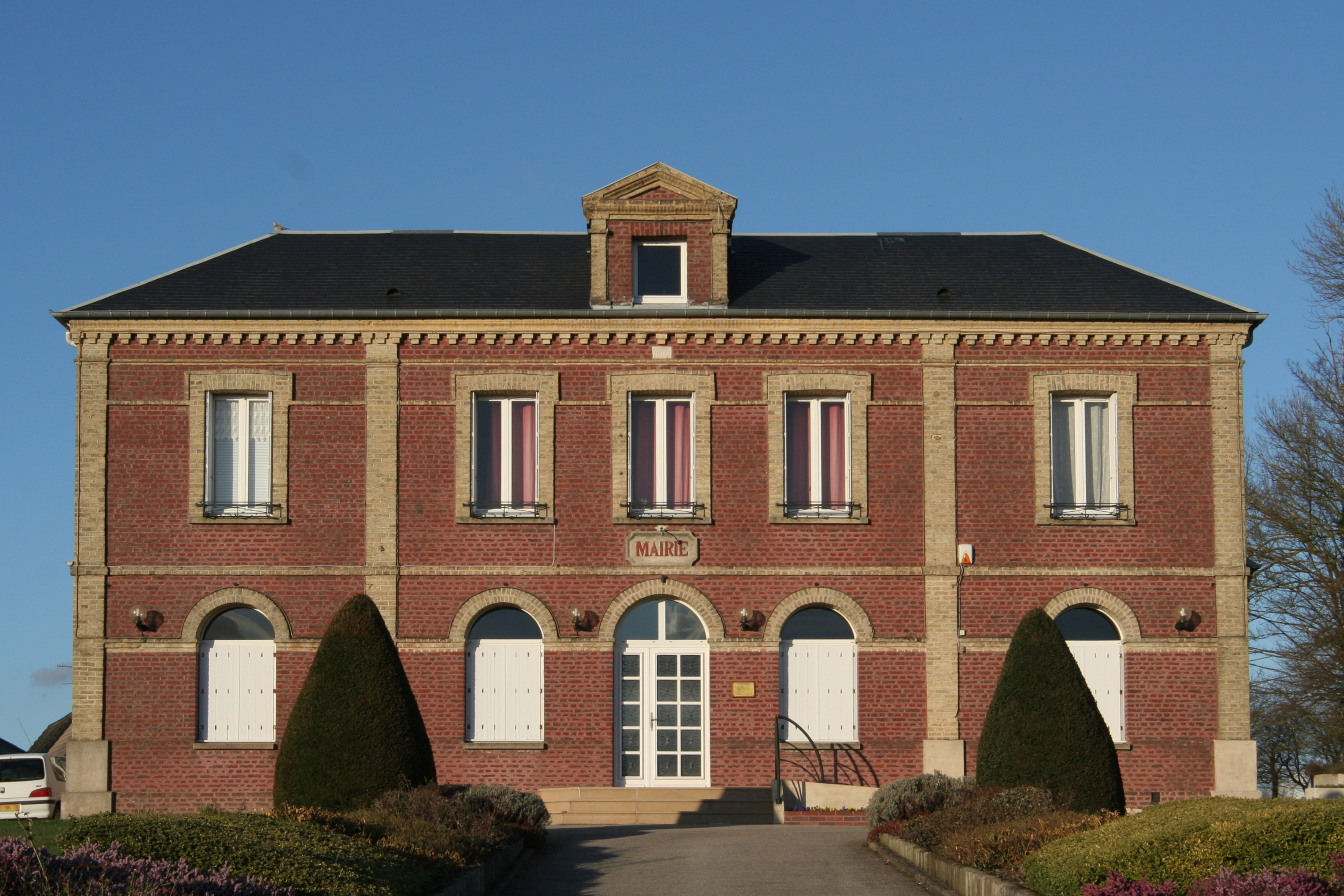 Mairie de Mélamare.